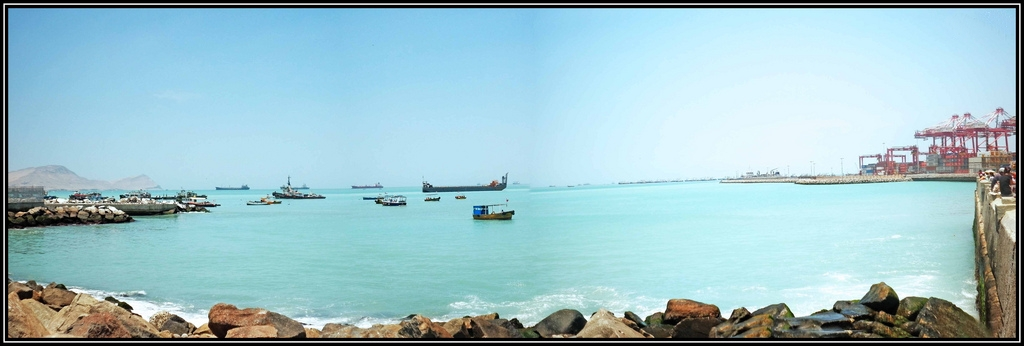 La perla del pacífico desde el siglo XV